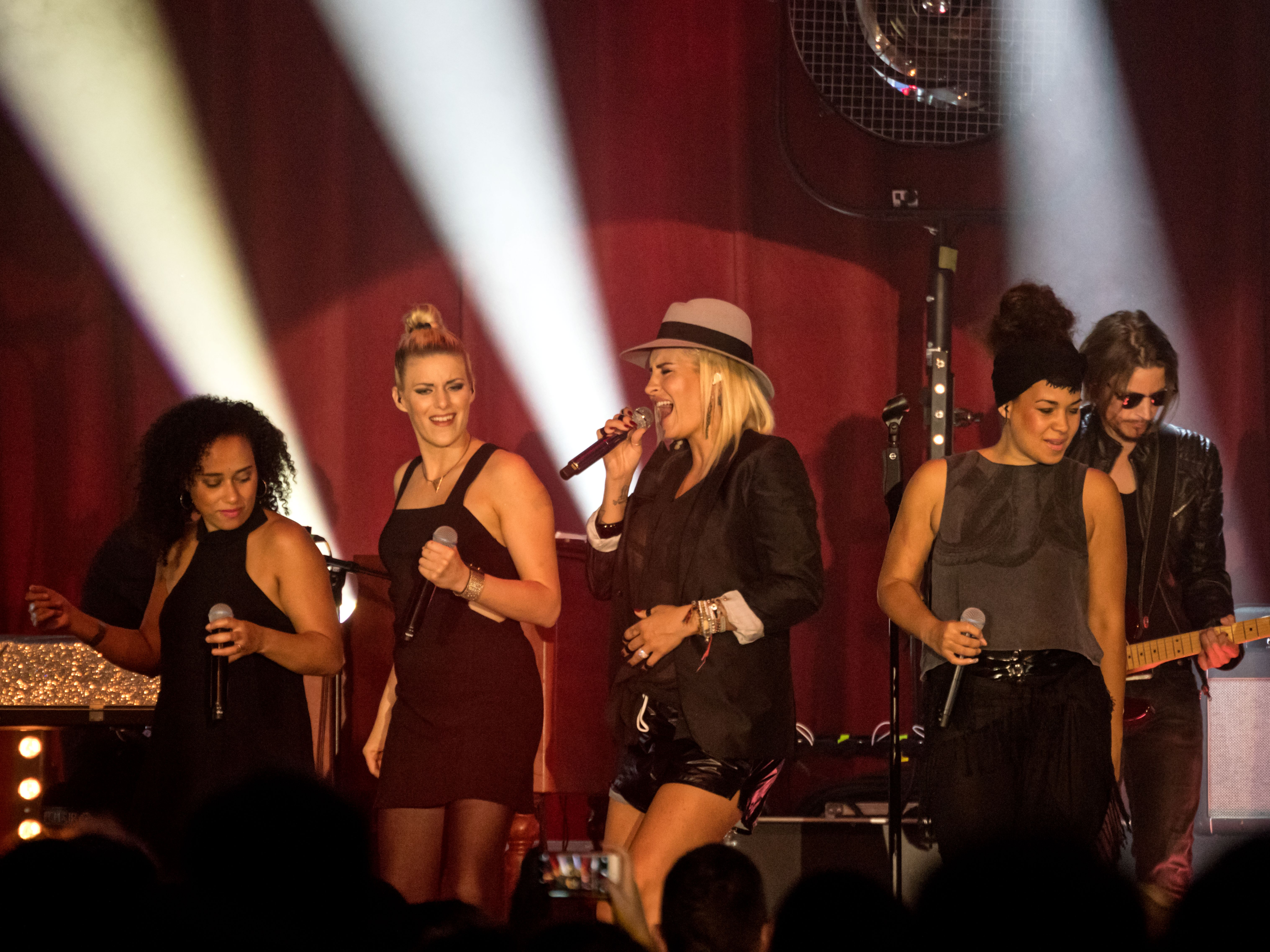 Bilder vom Zelt Musik Festival 2016 in Freiburg im Breisgau Sarah Connor